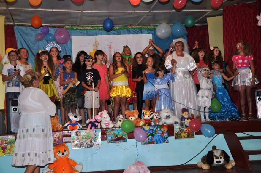 2013 ДЕНЬ ЗАХИСТУ ДІТЕЙ